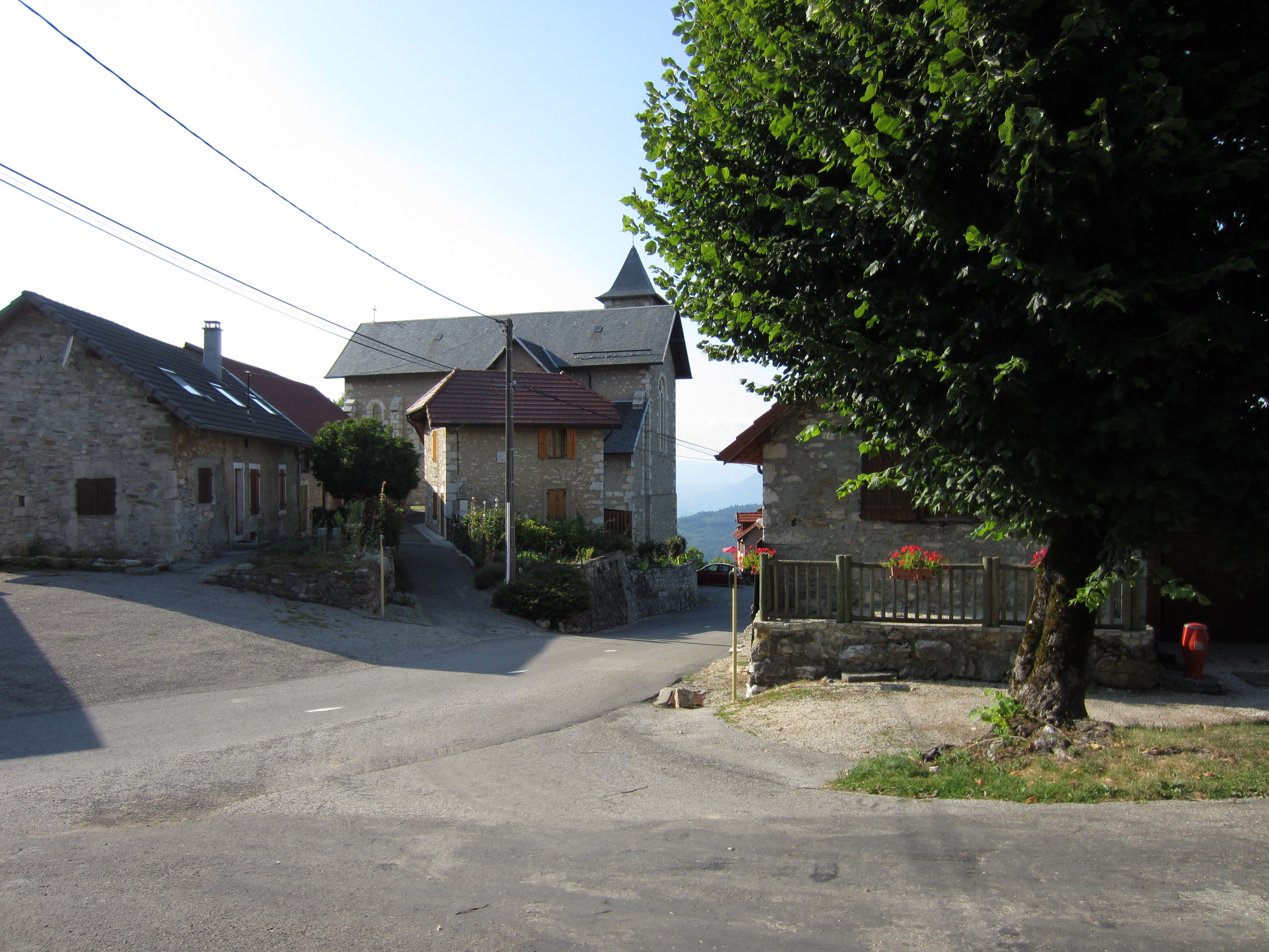 Le village d'Ontex.